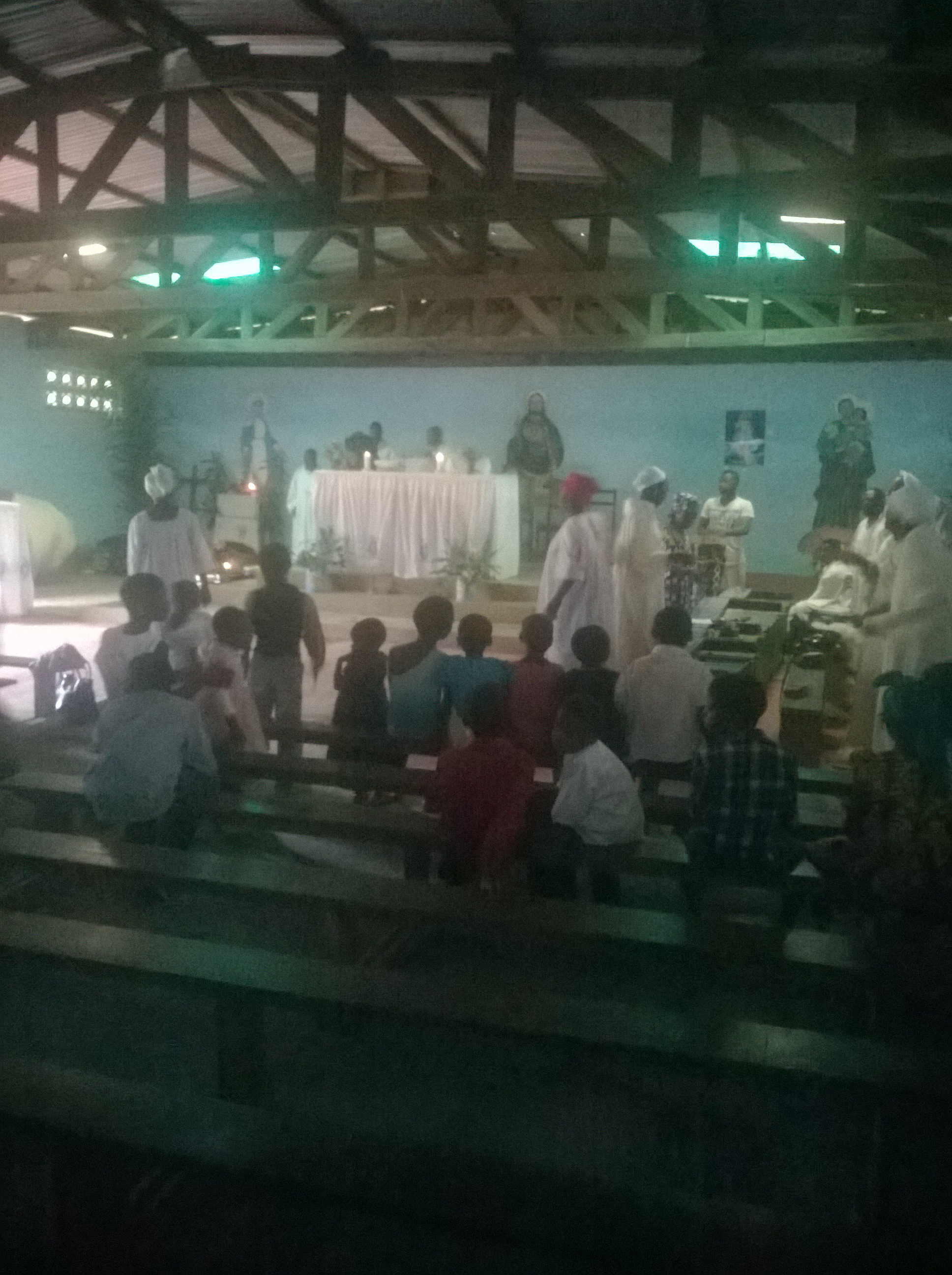 jour de le célébration du 15 août